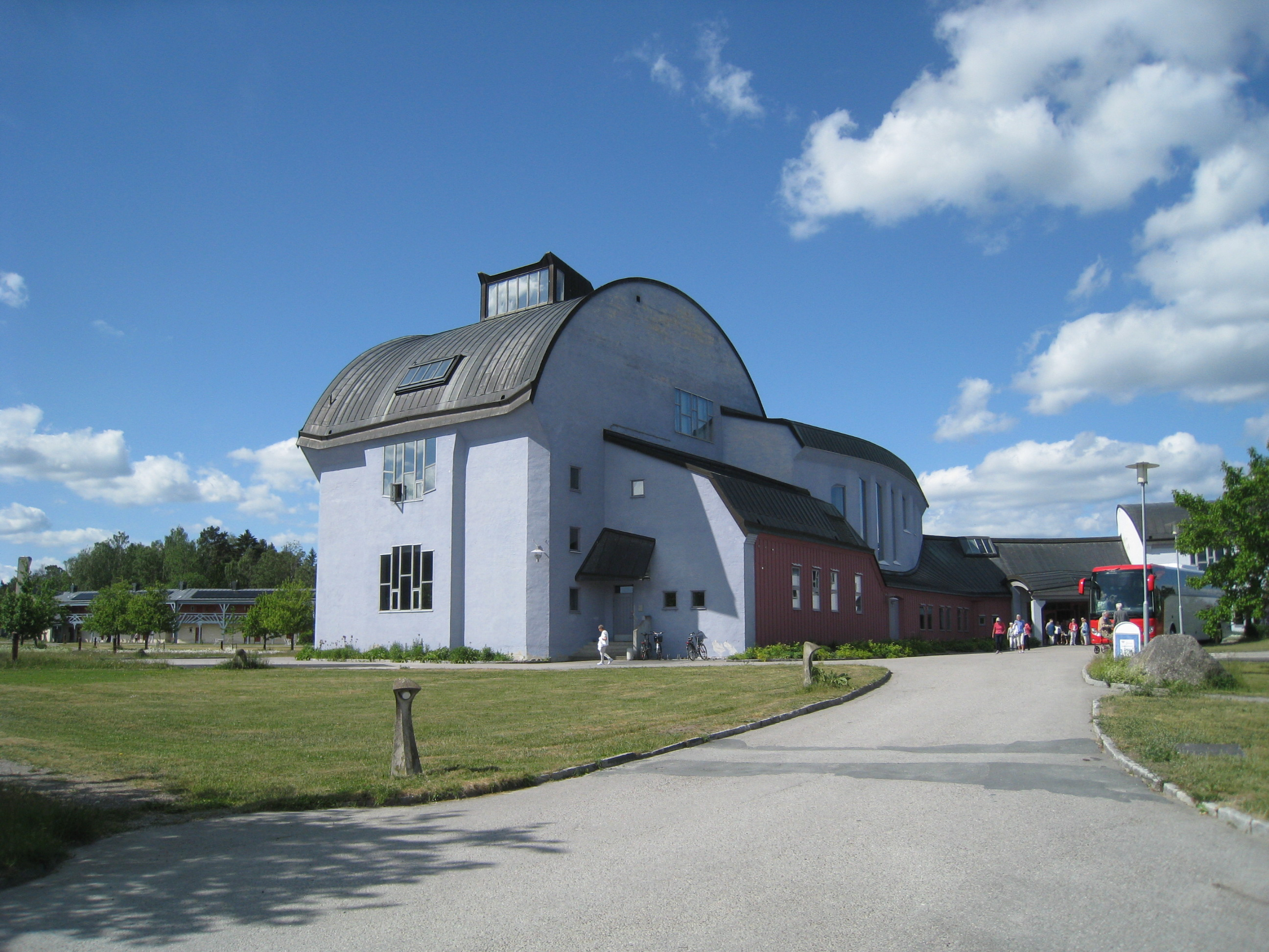 Rudolf Steinerseminariet, Järna och Kulturcentrum, Järna, Ytterjärna, Södertälje, Södermanland. Arkitekt Erik Asmussen. Kulturhuset i Järna invigdes 1992.